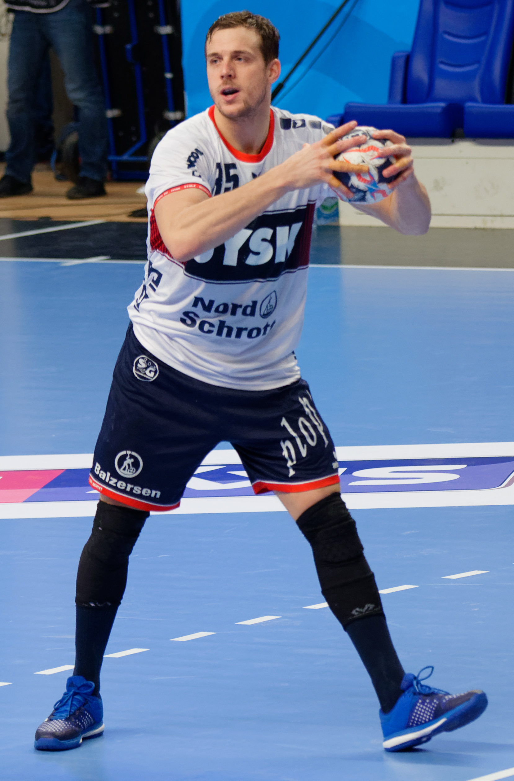 Rencontre de phase de groupe de la ligue des champions 2017/18 entre le PSG et SG Flensburg. A Coubertin, le 17 février 2018.